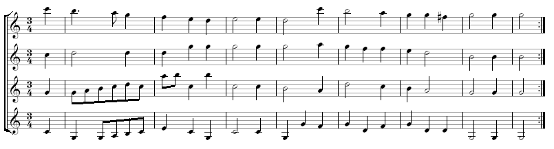 Galliarde (Auszug) Erstveröffentlichung um de:1530 durch Pierre Attaignant. Herausgegeben von Heinz Teuchert bei Musikverlag Hermann Schmidt, Frankfurt am Main Am Computer gesetzt von Mussklprozz am de:3. Februar de:2005